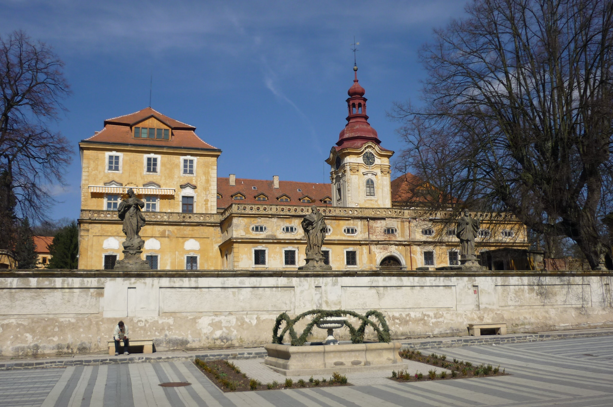 Barockschloss in Liebeschitz bei Leitmeritz